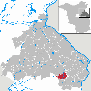 Lietzen in Brandenburg (Country) - District Märkisch-Oderland